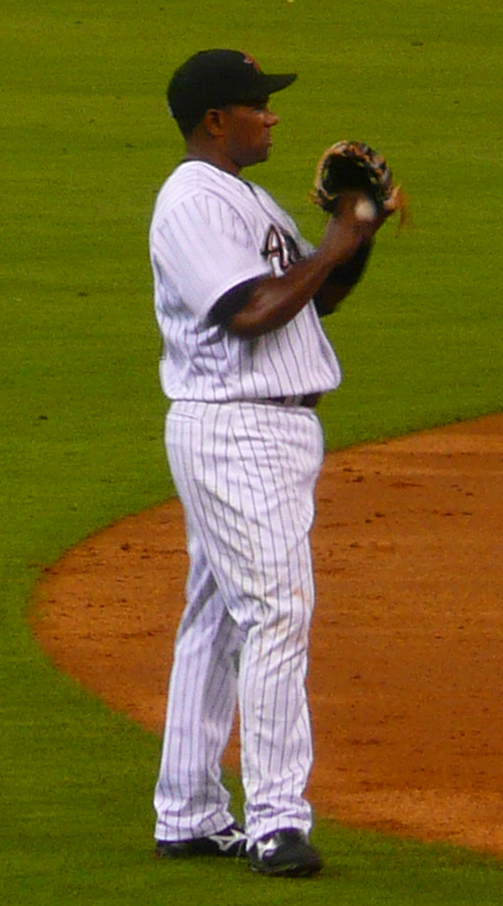 Miguel Tejada